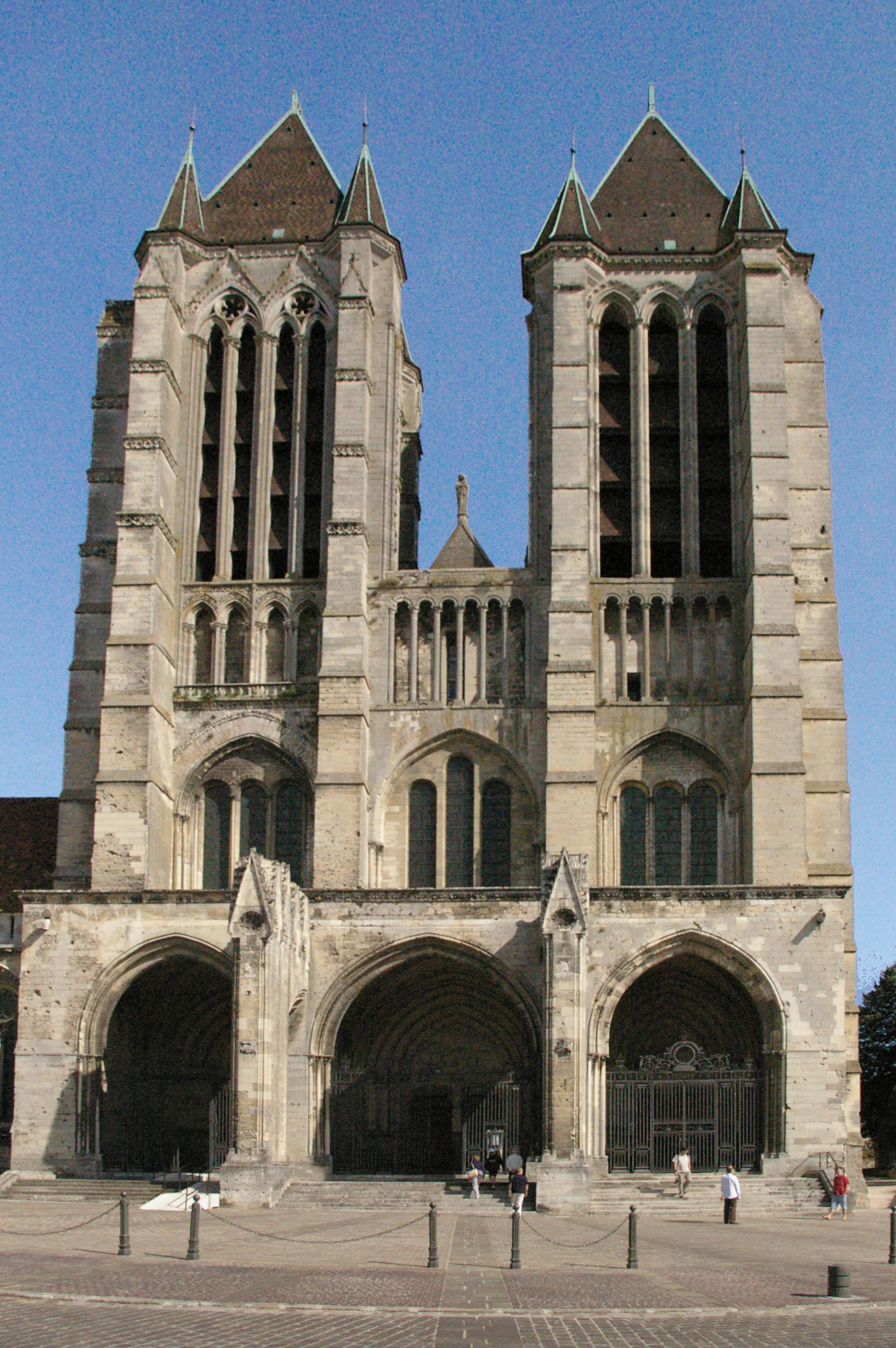 Façade de la cathédrale